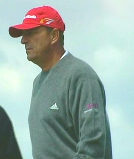 Bildbeschreibung: Gary Emerson bei den Austrian Open 2006 Quelle: eigene Aufnahme mit einer Handycam Fotograf/Zeichner: Boss 11:08, 13 June 2006 (UTC) Datum: 10.6.2006 Sonstiges: GNU